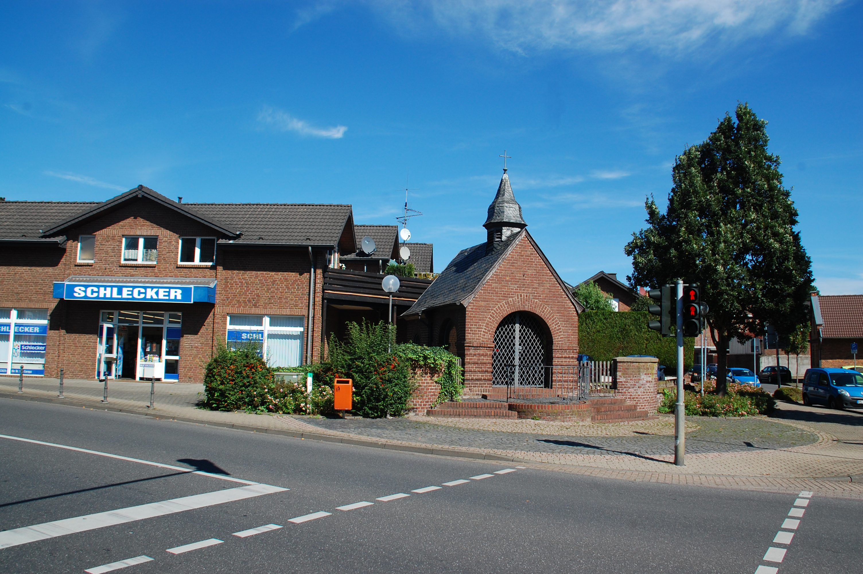 Kapelle Balkhausen, Kerpen